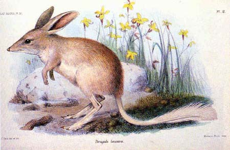 Lesser bilby ou petit bilbi Macrotis leucura